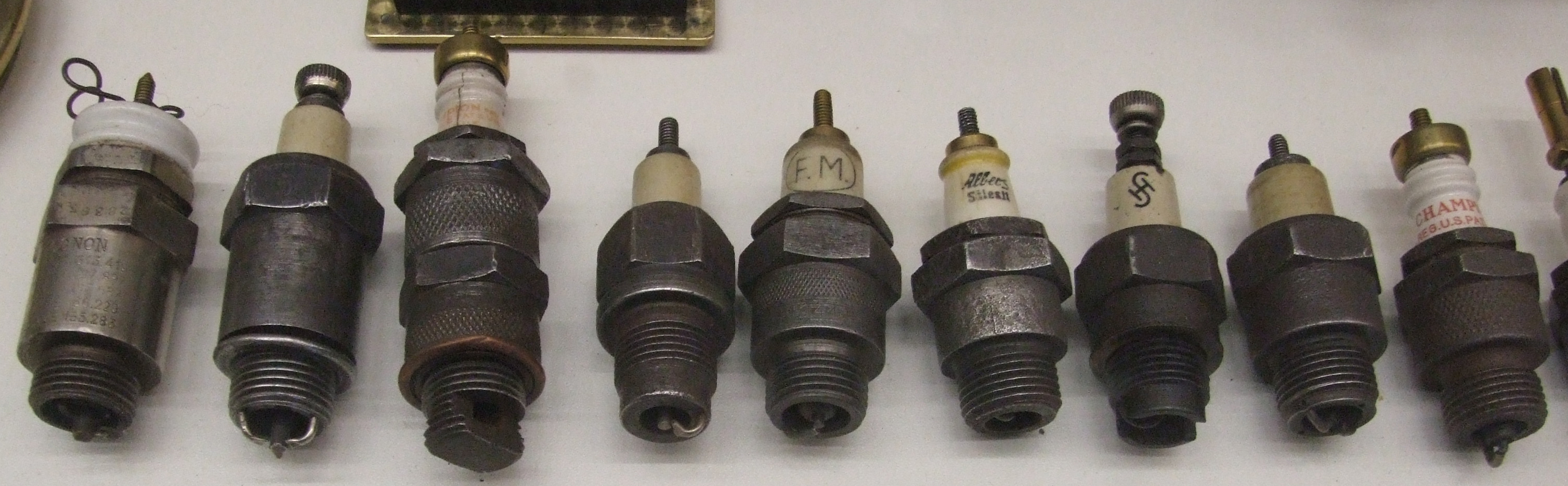 Sammlung historischer Zündkerzen, Teil 1, Museum Autovision, Altlußheim